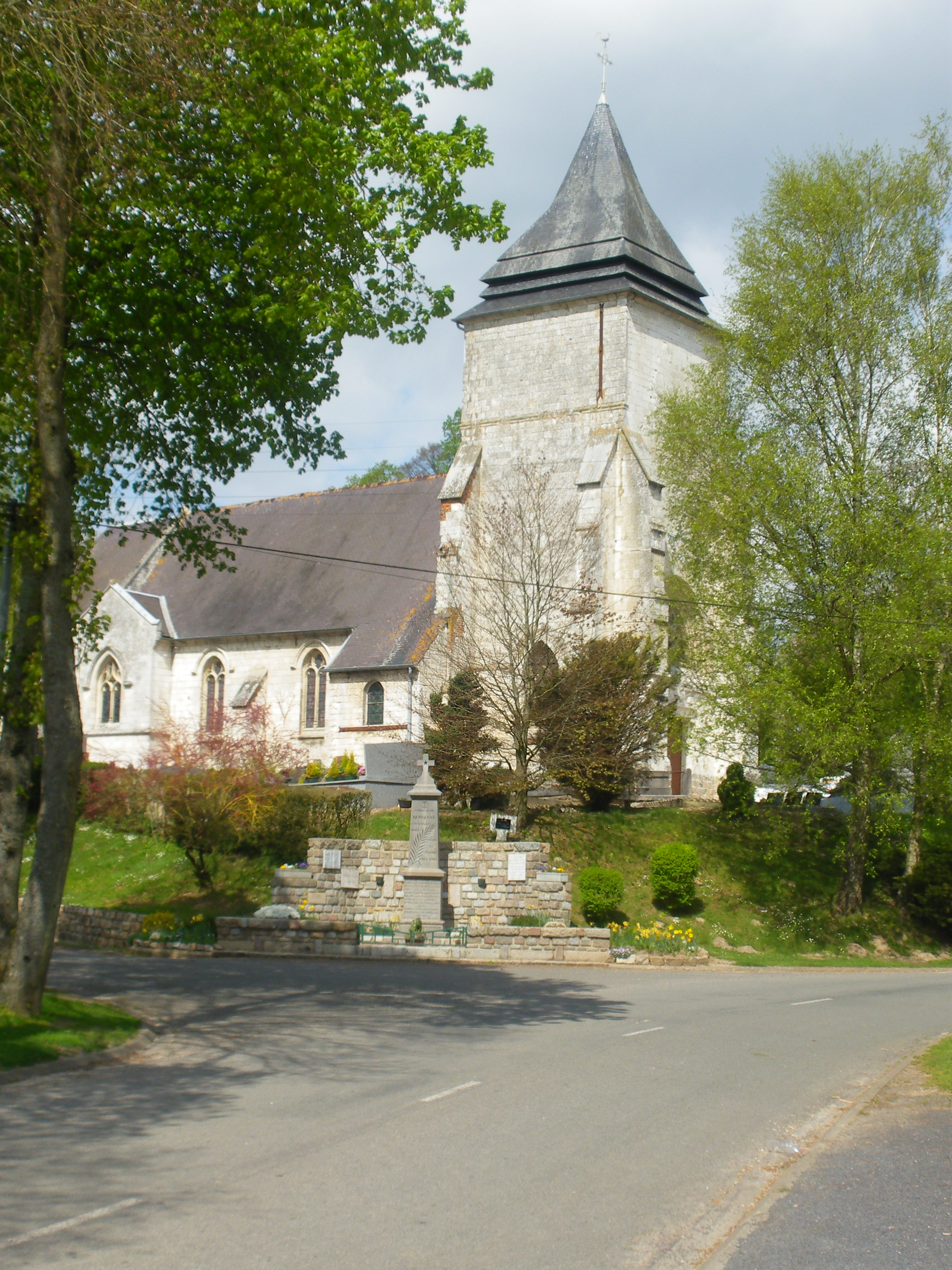 Vue de l'église Saint-Vaast et du monument aux morts de Rebreuve-sur-Canche.